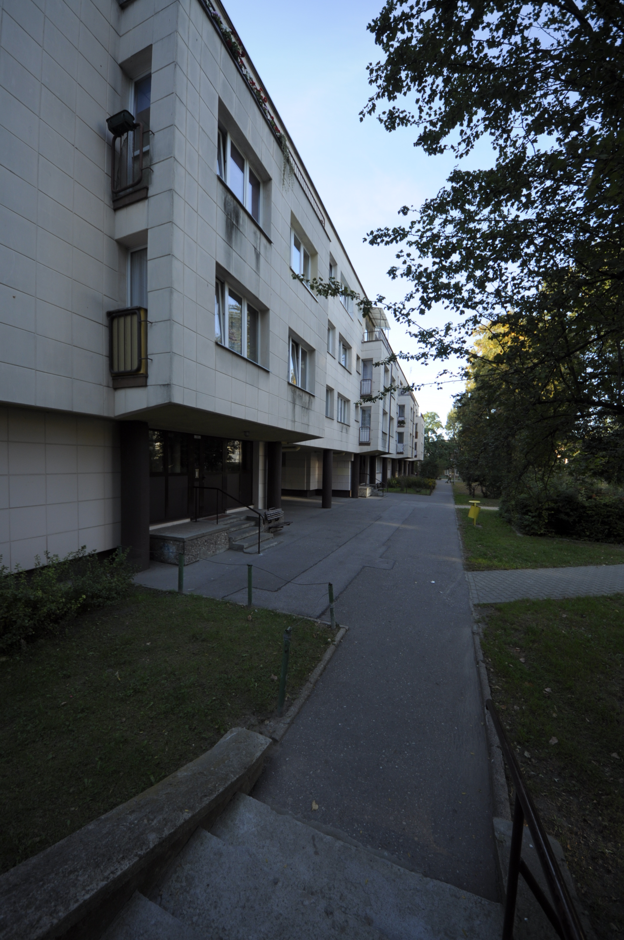 układ urbanistyczny i zespół budowlany osiedli „Koło II” i „Koło III” wraz z zielenią w granicach ulic: Ożarowska – Prymasa Tysiąclecia – Czorsztyńska – Deotymy , 1947-56–domy, ul. Czorsztyńska 2A, 8, 12–domy, ul. Deotymy 46, 48–domy, ul. Dobiszewskiego 1, 2, 3, 3A, 5–domy, ul. Magistracka 22, 24, 24A, 25, 27–domy, ul. Ożarowska 65/67–domy, ul. Raszei 1/3, 2, 5, 8–domy, ul. Ringelbluma 1, 2–domy, al. Prymasa Tysiąclecia 139/143, 139A–domy, ul. Sitnika 2, 3, 4, 6 Wola 11.1992.